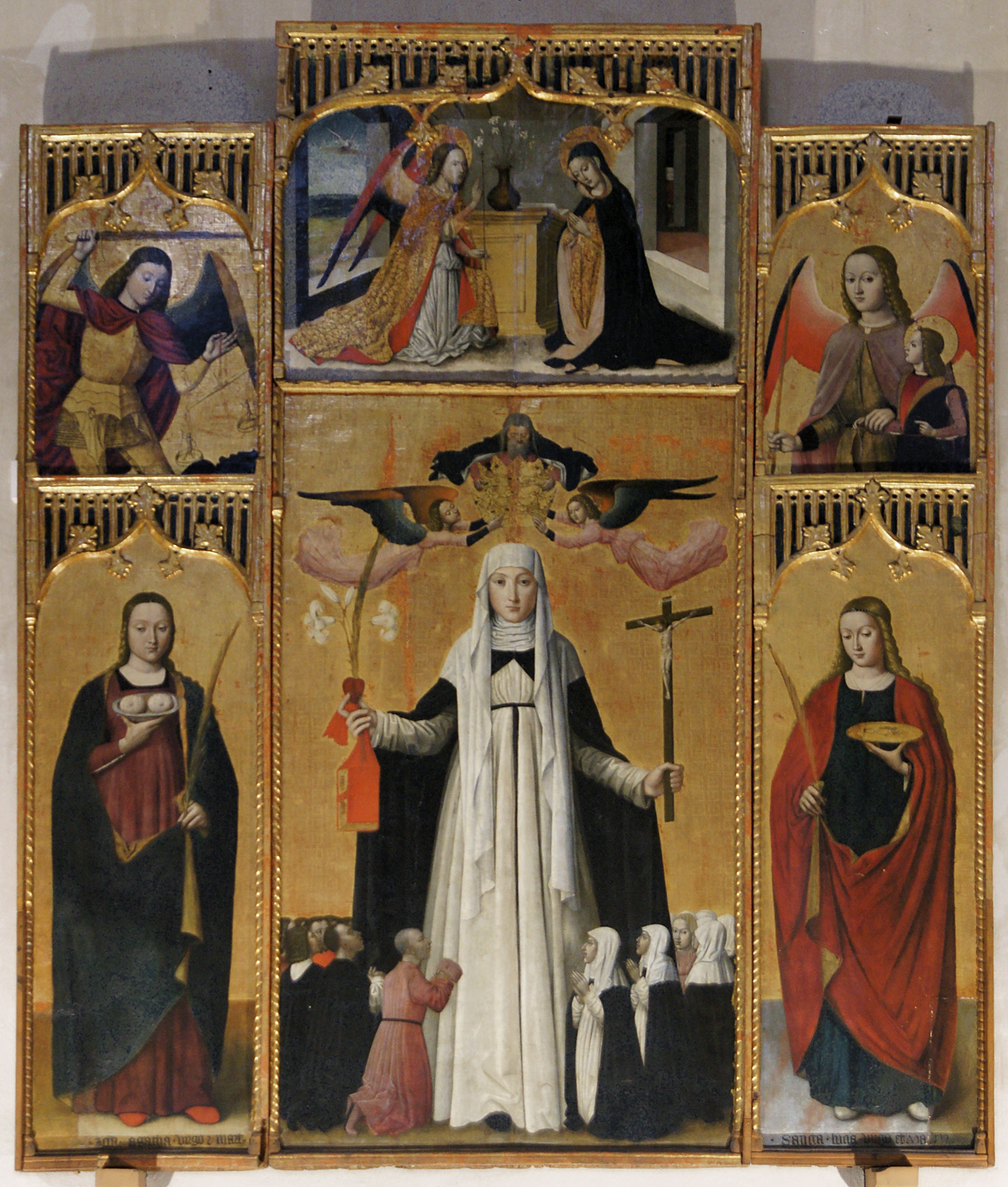 Eglise du Couvent des Dominicains à Taggia - Rétable de Ste-Catherine de Sienne - Attribution incertaine à Louis Bréa (1488)